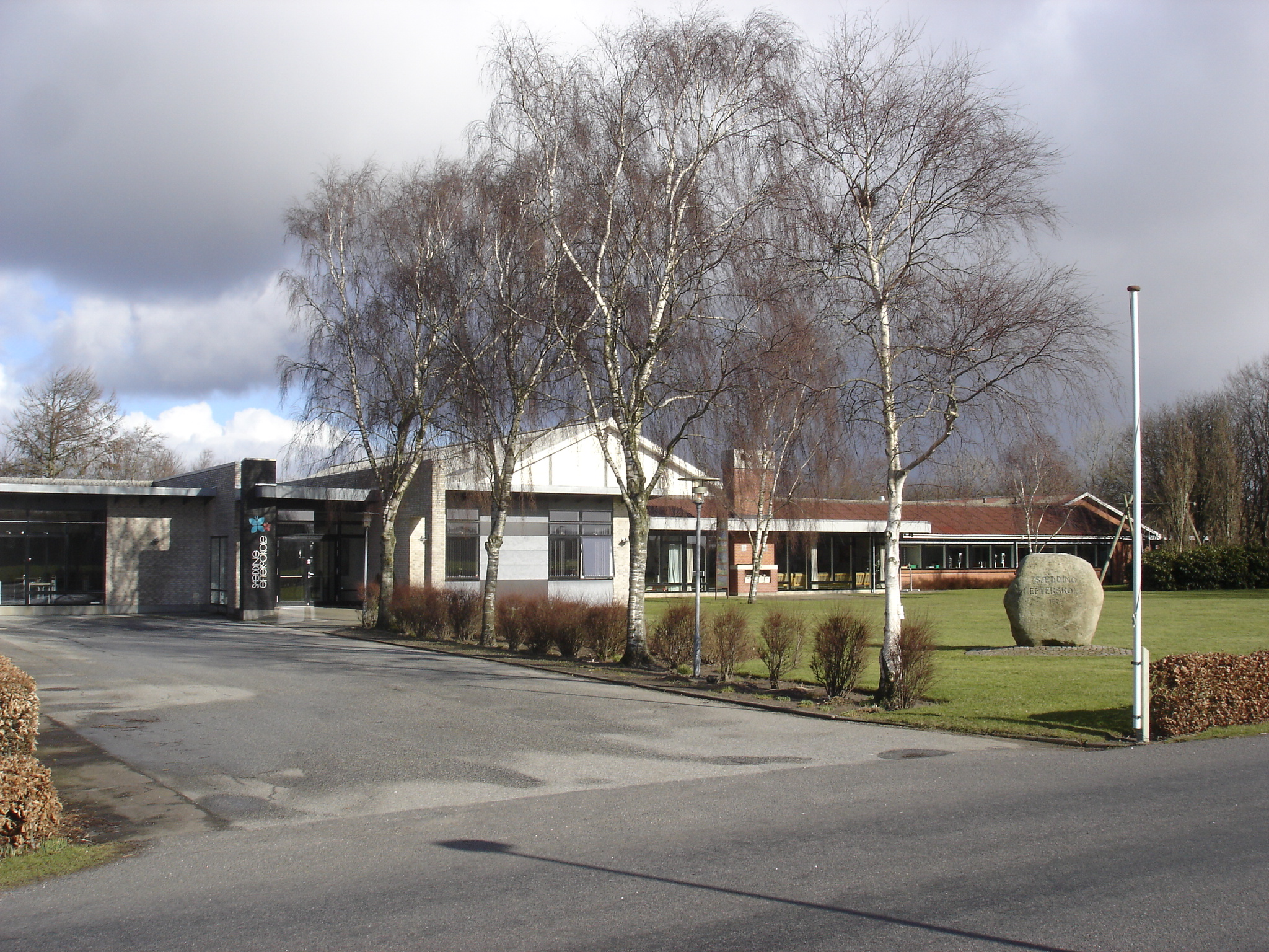 Sædding Efterskole, østfløjen